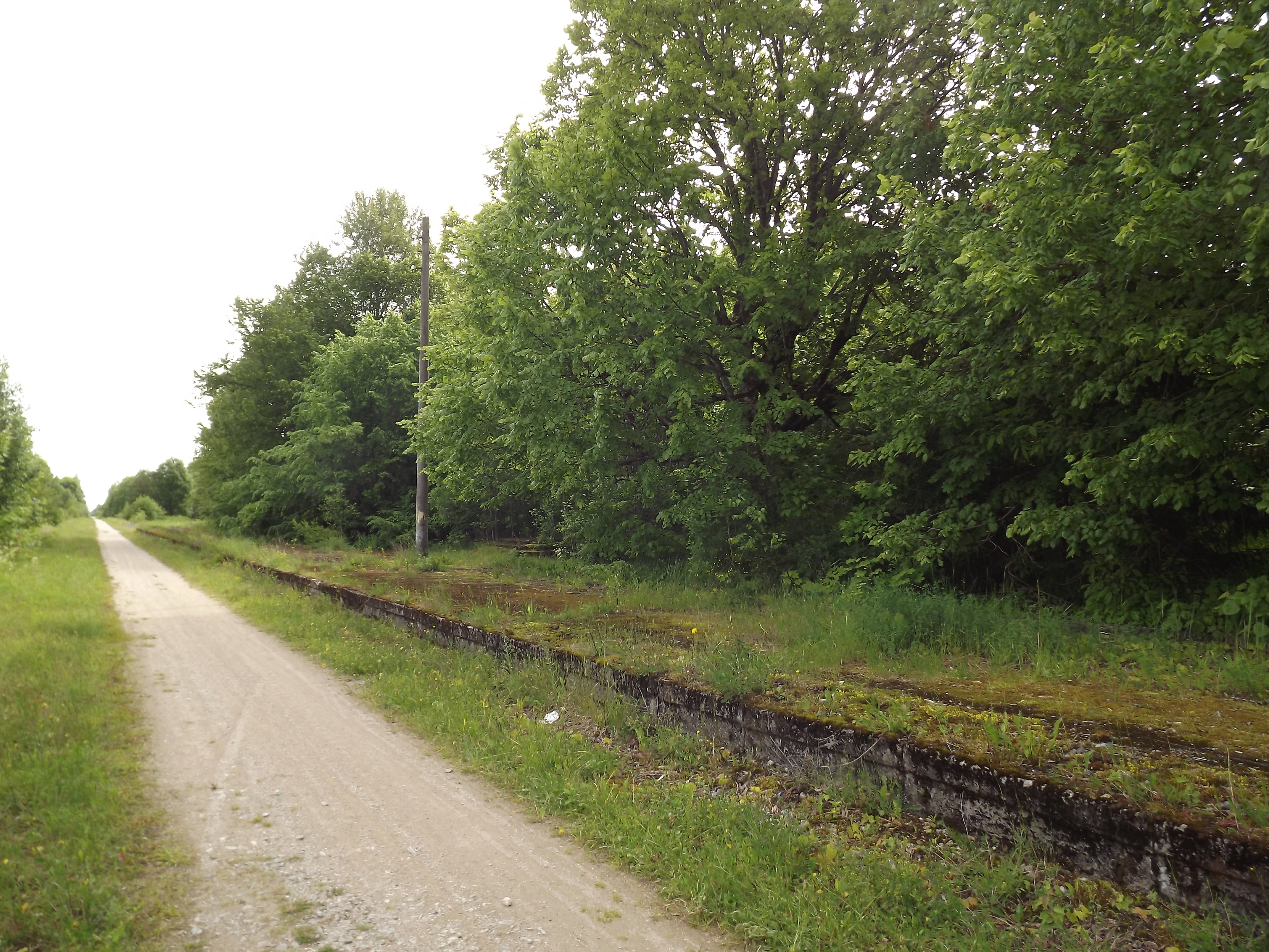 Endine Ellamaa raudteepeatus (perroon).